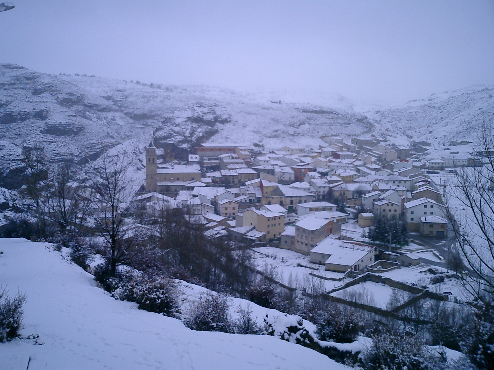 Foto de Villar del Cobo